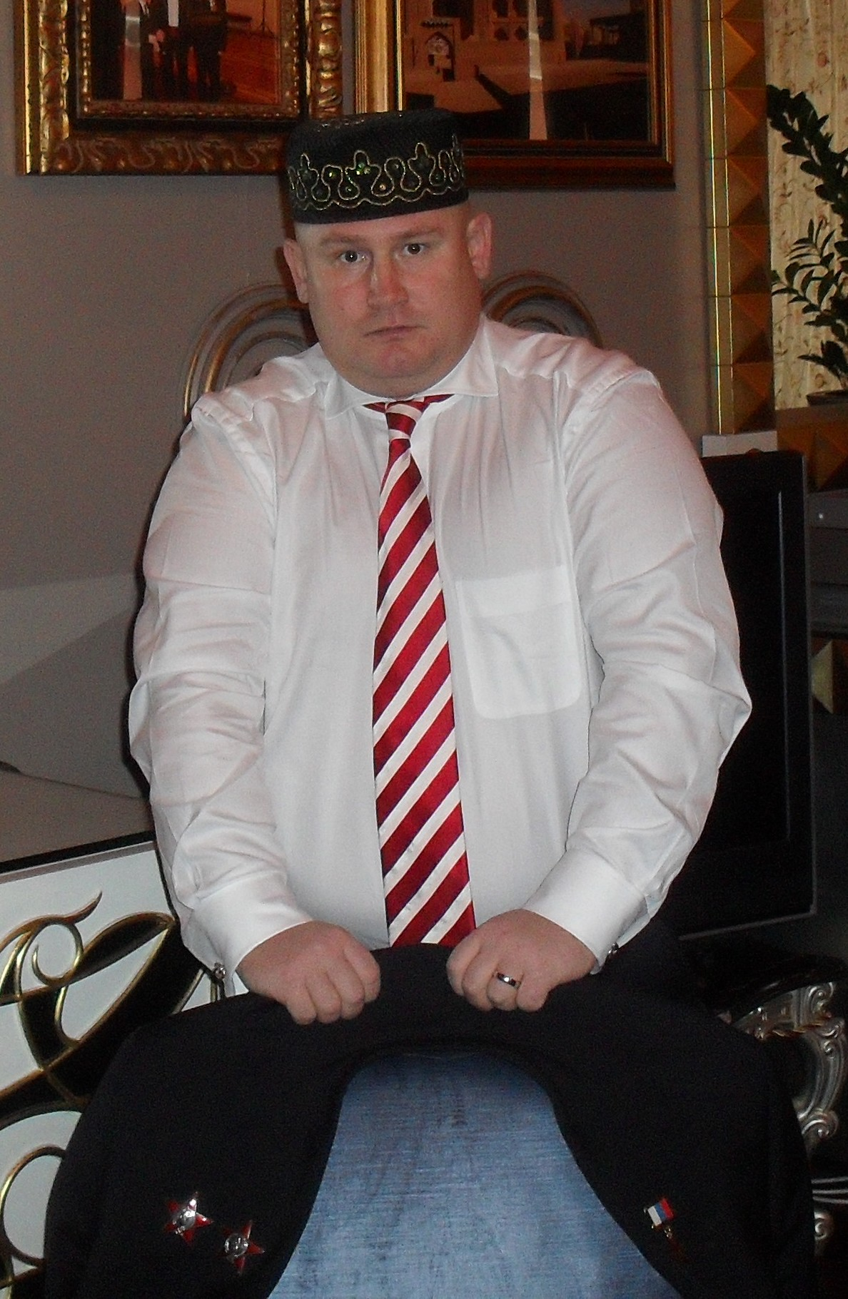 Дауди Ильяс Дильшатович